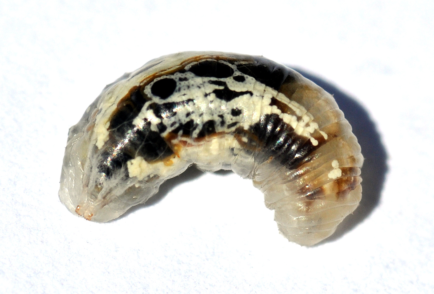 Eine Larve einer unbestimmte Syrphidae von einem Mangoldblatt. Grösse ca. 8mm